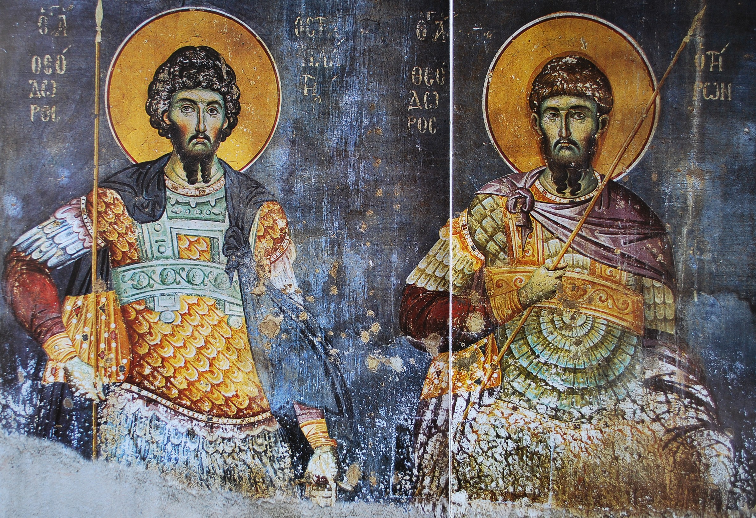 Фреска «Феодор Стратилат и Феодор Тирон» в Протате